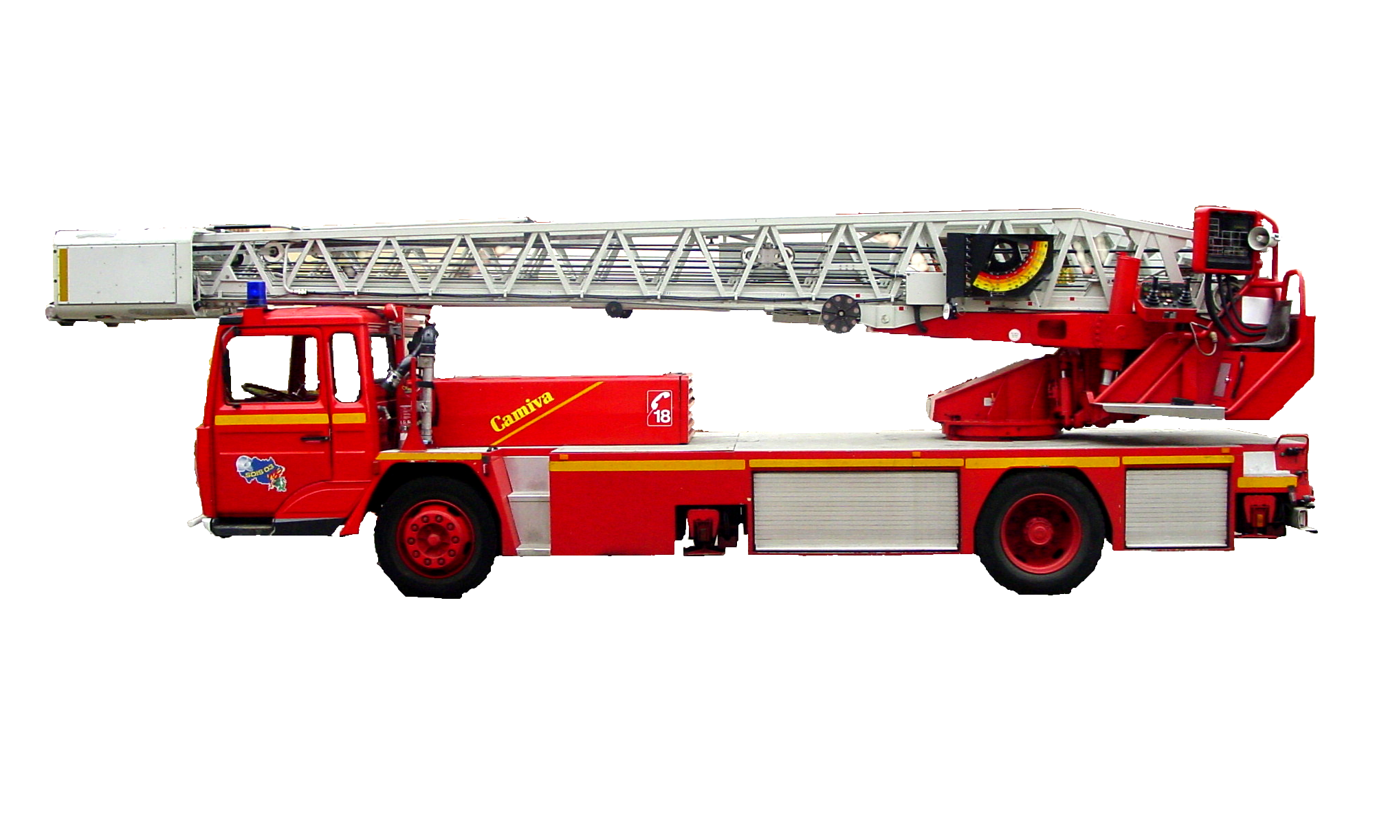 EPA pompier vue de cote